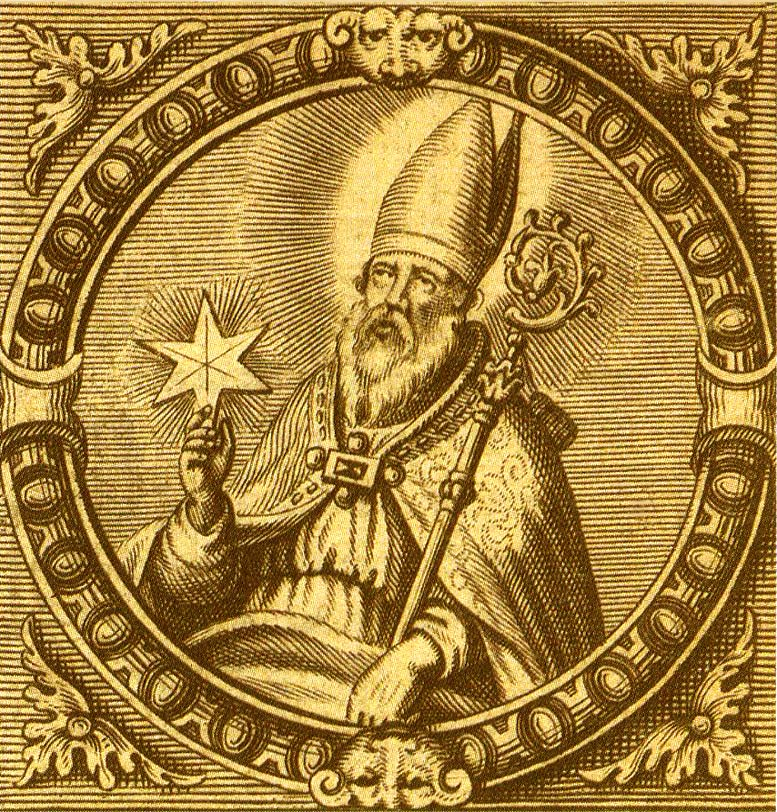 Der heilige Suitbertus (Kaiserswerth, Düsseldorf)6 VII-VIII Jahrh.